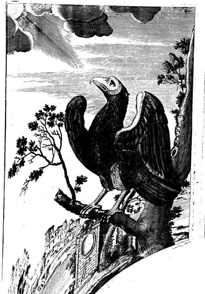 Логическая модель орла. Иллюстрация из трактата "Opera: divisa in cinque libri ne'quali si tratta delle regole di Cavalcare, della professione di Spada, ed altri Esercici d'Armi... : con un Trattato del modo di curare l'infermità de'cavalli... : parimente con l'aggiunta d'alcune Rime, lettere e trattati di fisonomia, pittura, &c ; data in luce da Ettorre D'Alessandro..." Giuseppe D'Alessandro Antonio Muzio